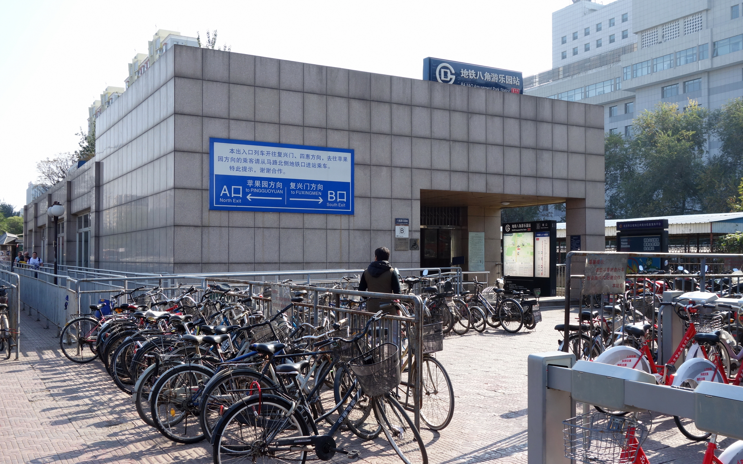 北京地铁1号线八角游乐园站地面站厅